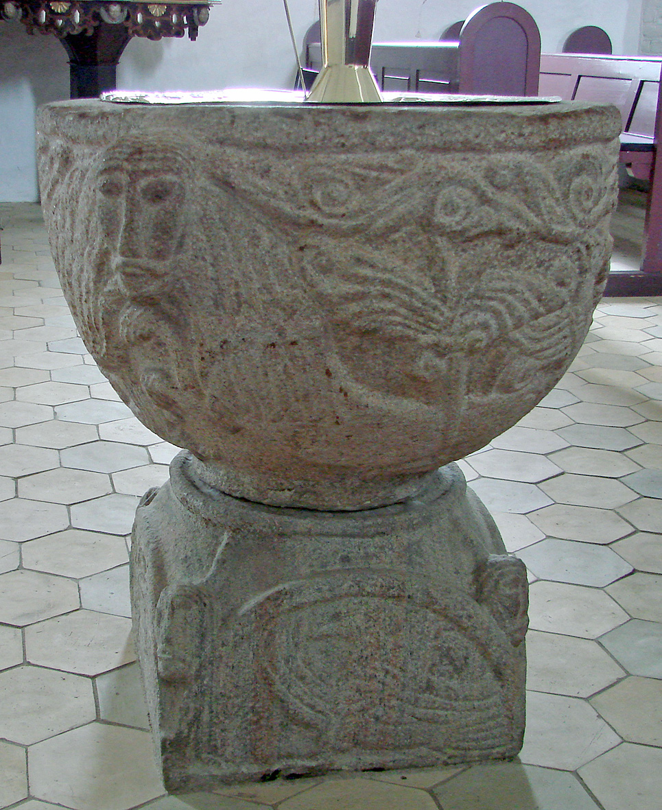 Døbefont i Haldum Kirke der ligger i Haldum Sogn, Sabro herred. Århus amt, Århus stift, Østjylland, Denmark. Haldum Kirke